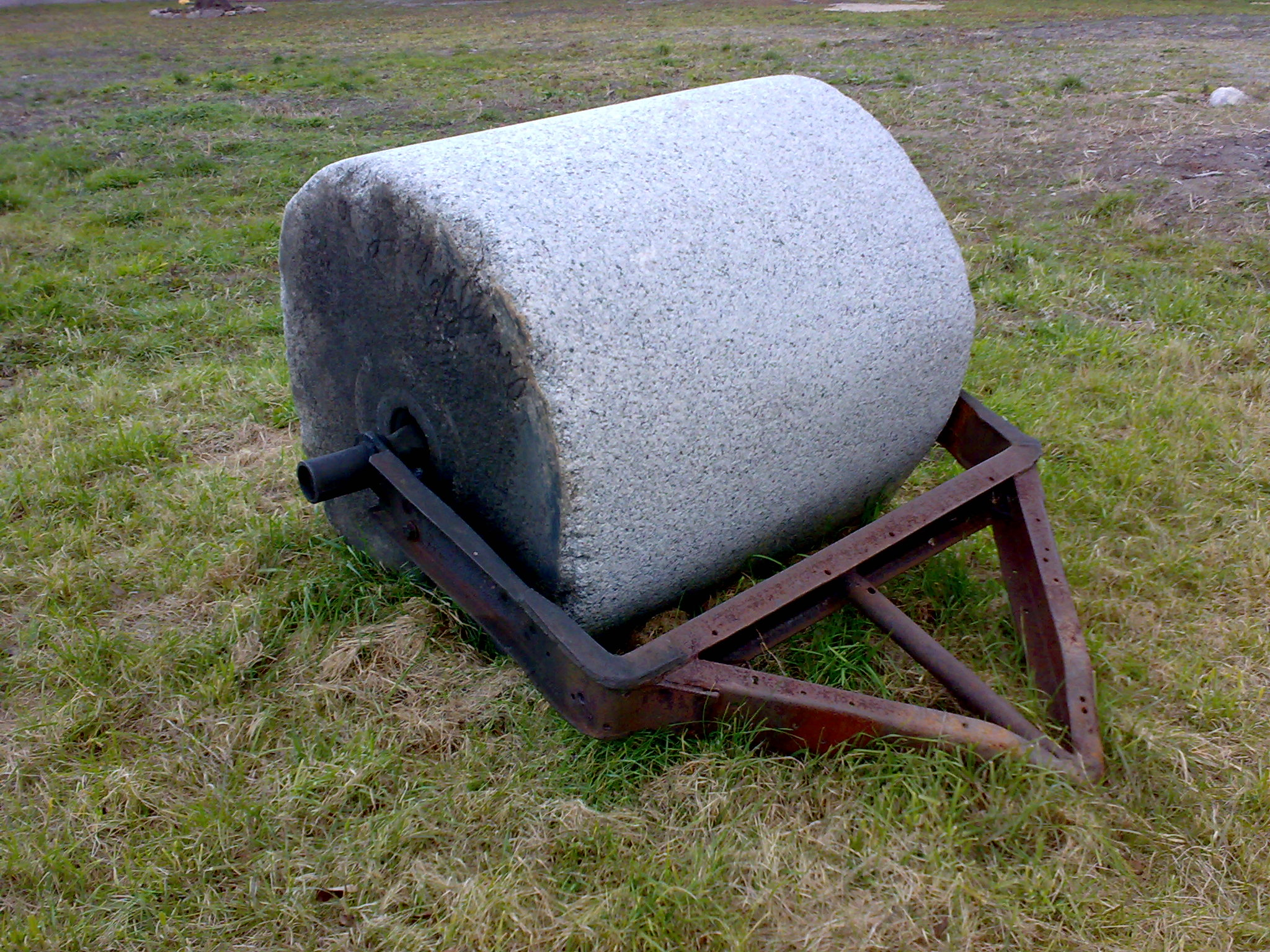 Wał polowy kamienny